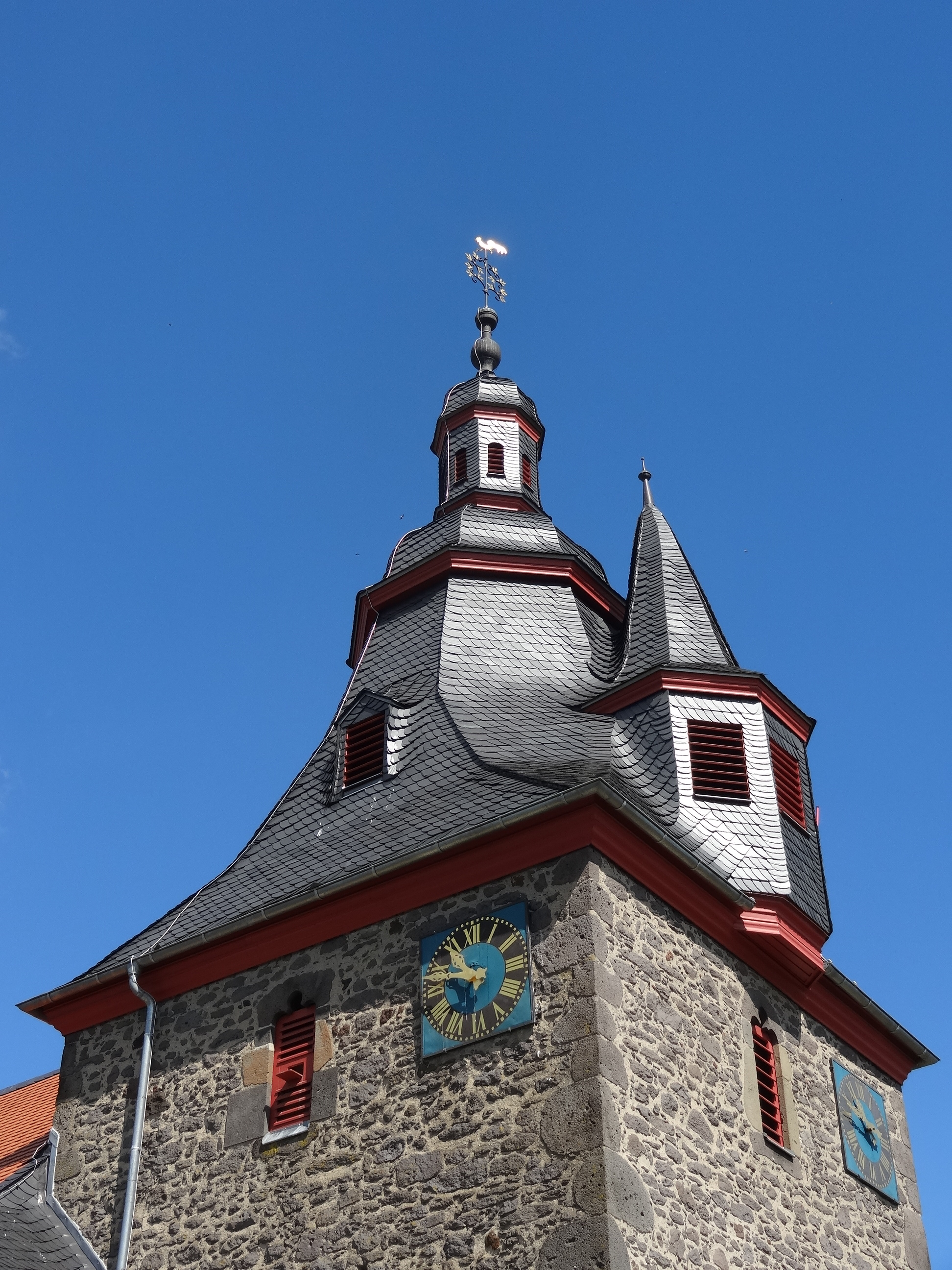 Evangelische Kirche Nonnenroth (Hungen)